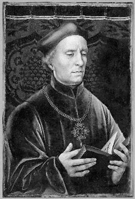 Bischof Heinrich III., der letzte katholische Bischof von Lübeck, gemalt von Jacob van Utrecht.